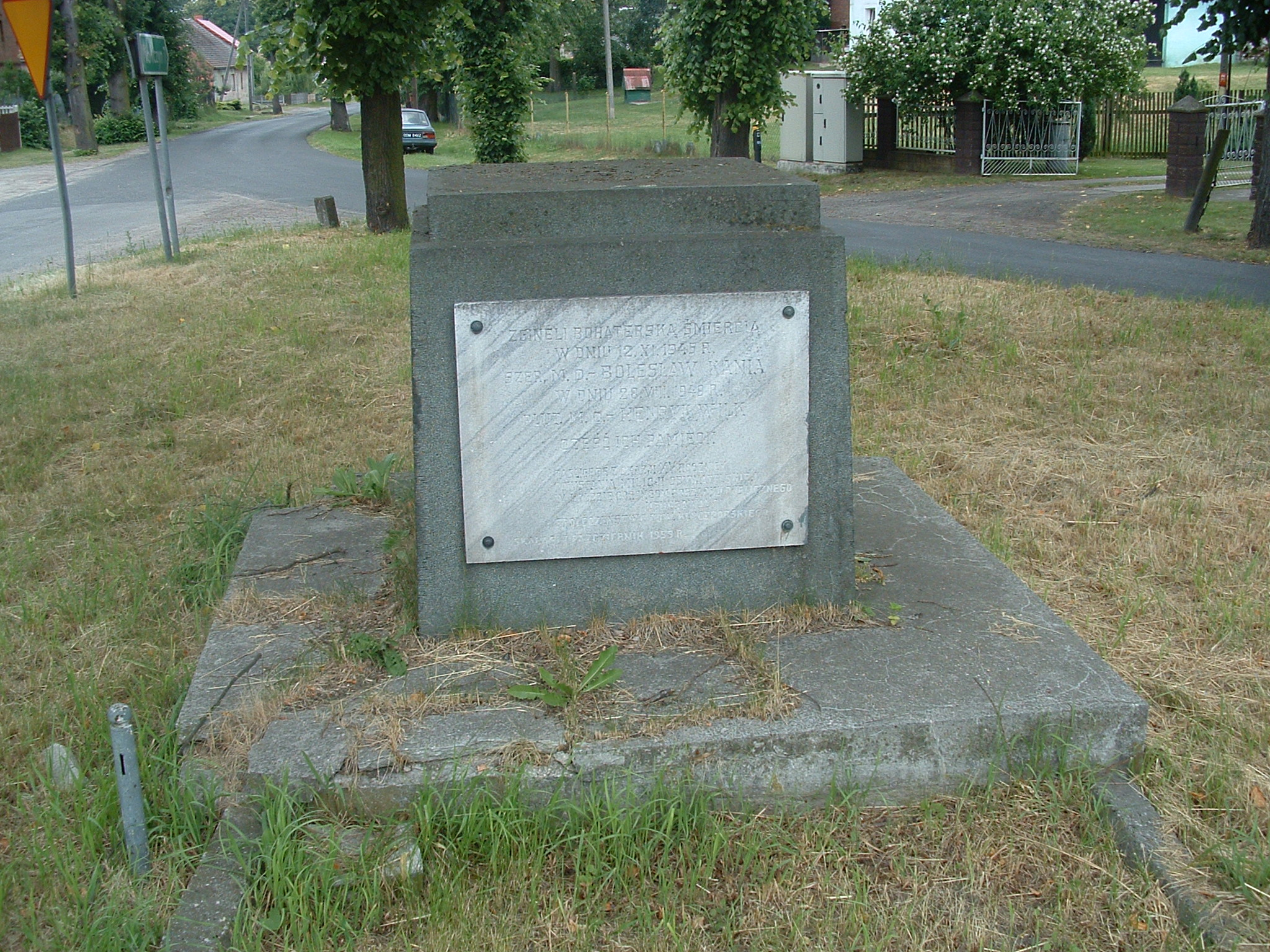 Skałągi